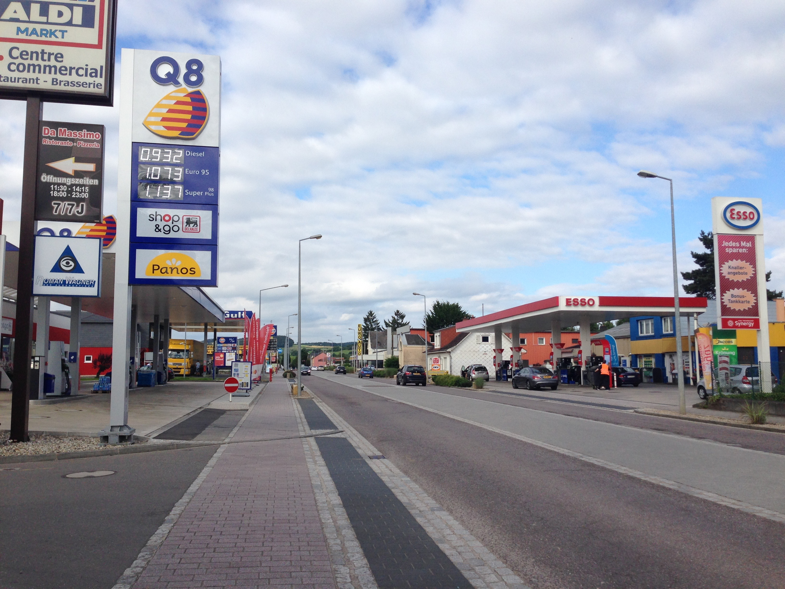 Mertert-Wasserbillig in Luxemburg